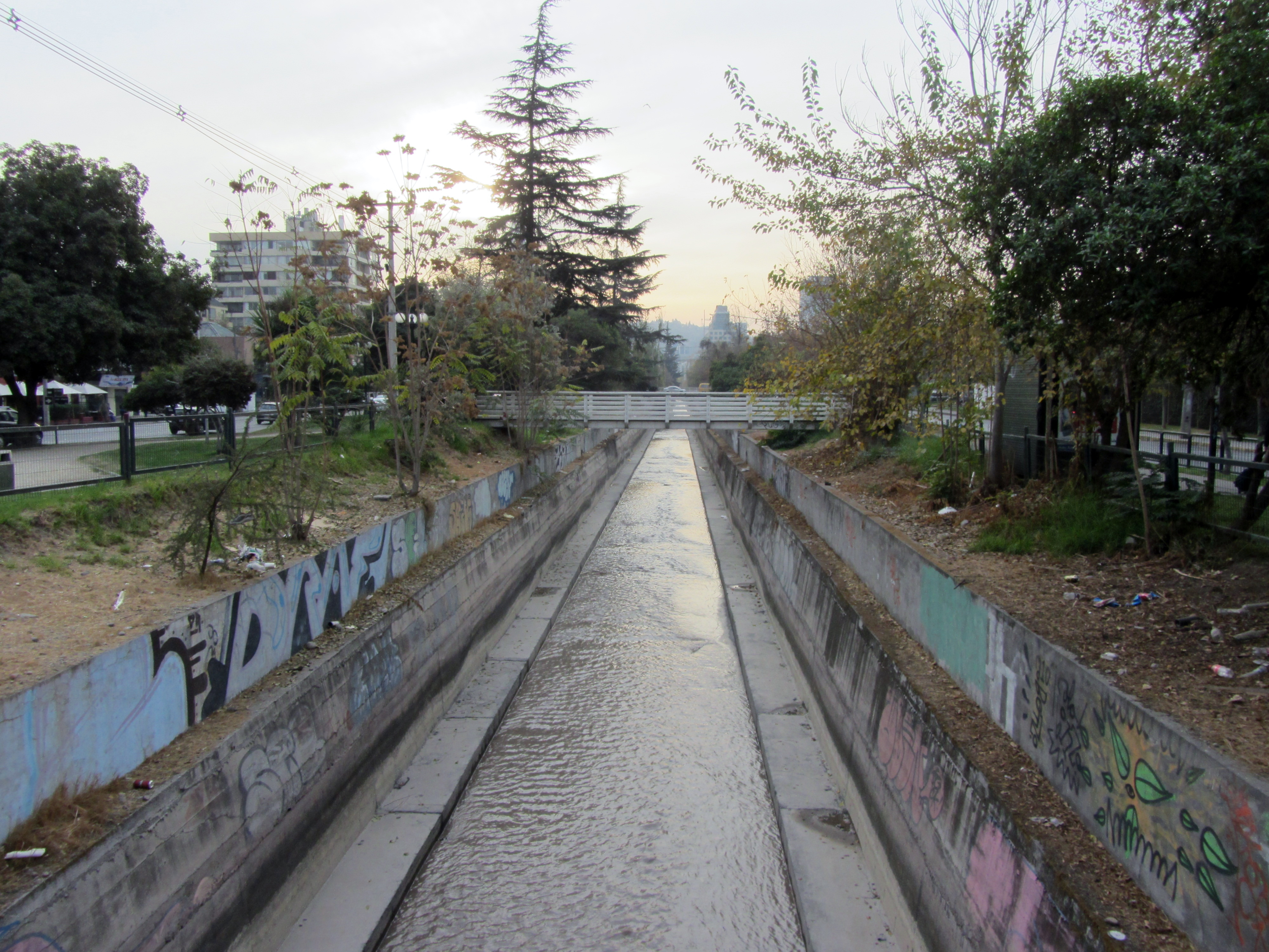 El canal San Carlos, Santiago de Chile. Foto tomada hacia el norte desde el puente en avenida Colón que cruza la Tobalaba.